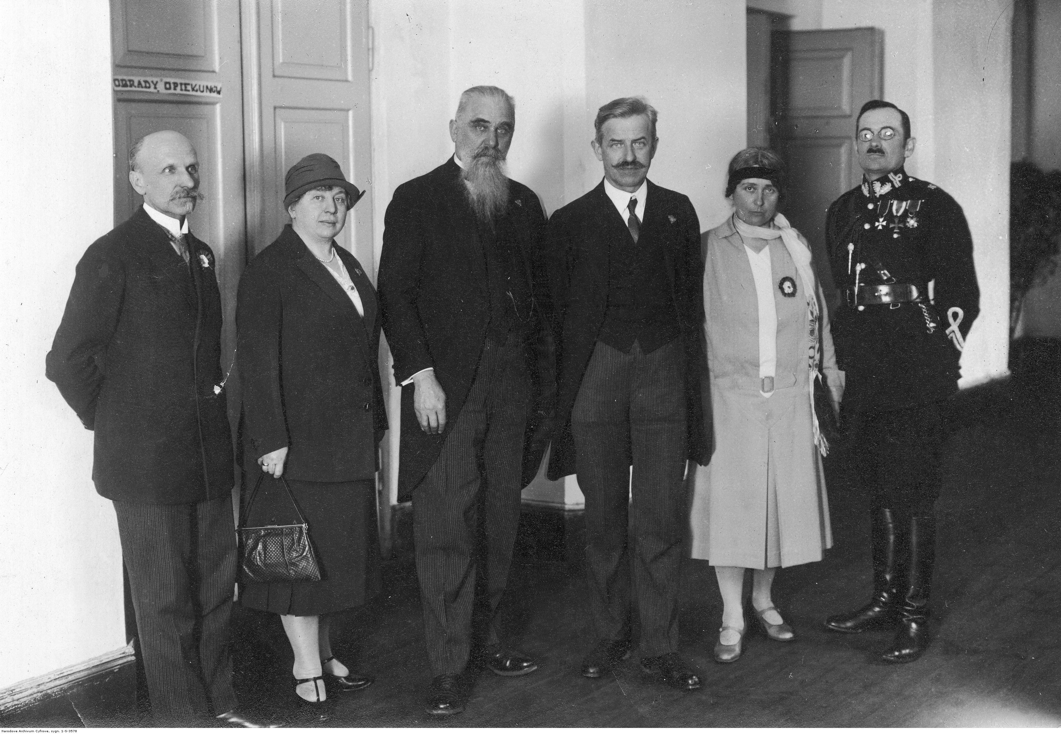 Zarząd wileńskiego oddziału Polskiego Towarzystwa Krajoznawczego w 1928. Członkowie zarządu. Widoczni m.in.: wiceprzewodniczący Bronisław Zapaśnik (1. z lewej), sekretarz Zofia Kiewlicz przewodniczący profesor Kazimierz Sławiński (z brodą), profesor Leopold Węgrzynowicz (3. z prawej), inspektor Policji Państwowej Bronisław Praszałowicz (w mundurze).